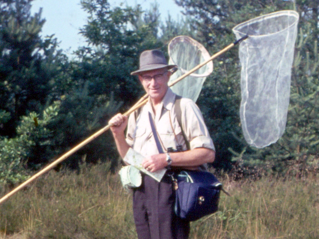 Maurits Lieftinck op libellenexcursie in Nwederland in de jaren zeventig